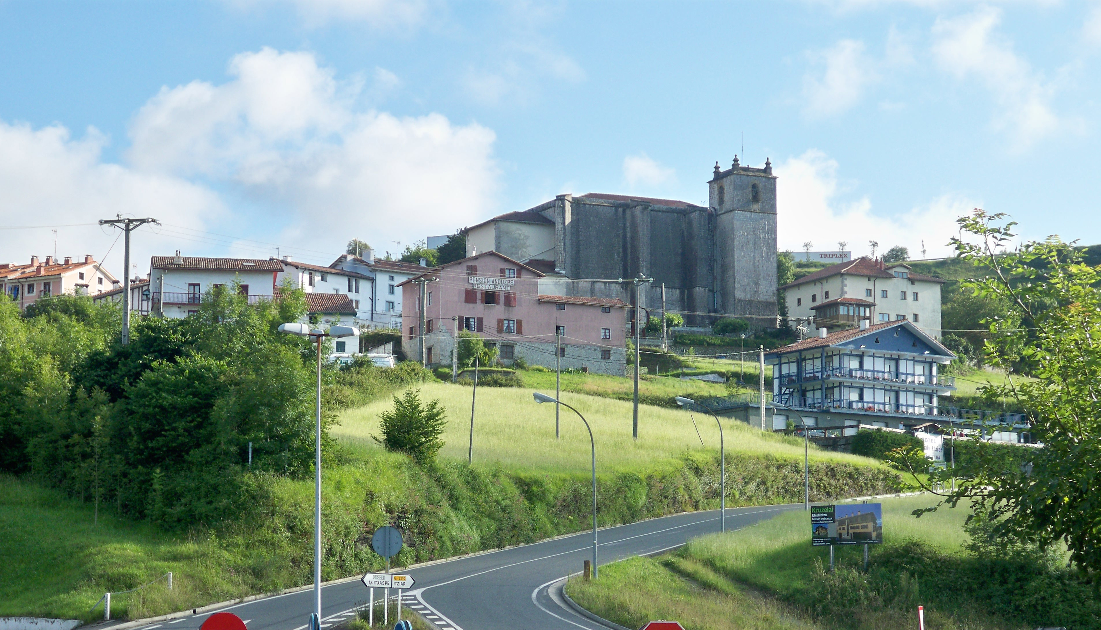 Itziarreko ikuspegia